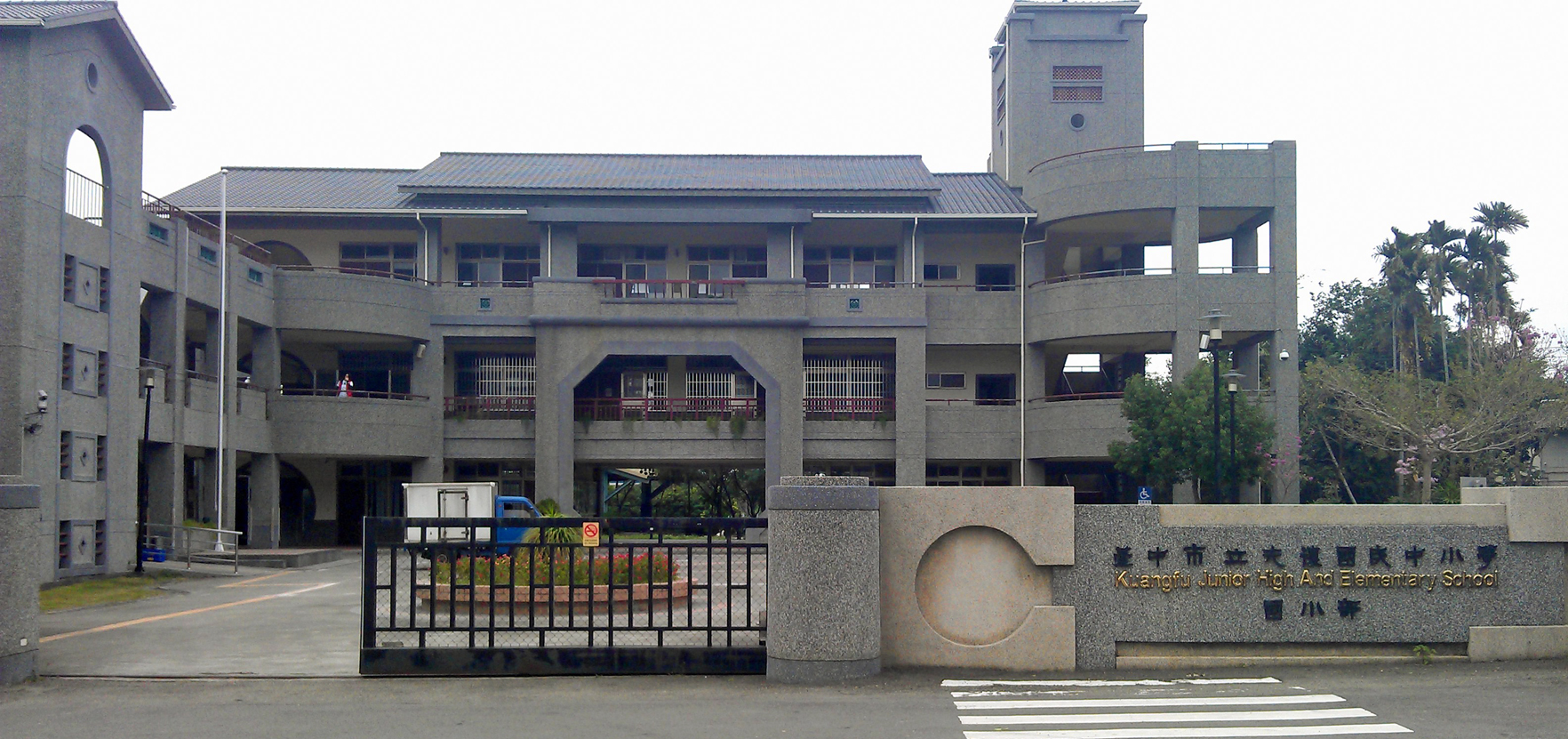 臺中市光復國中小小學部